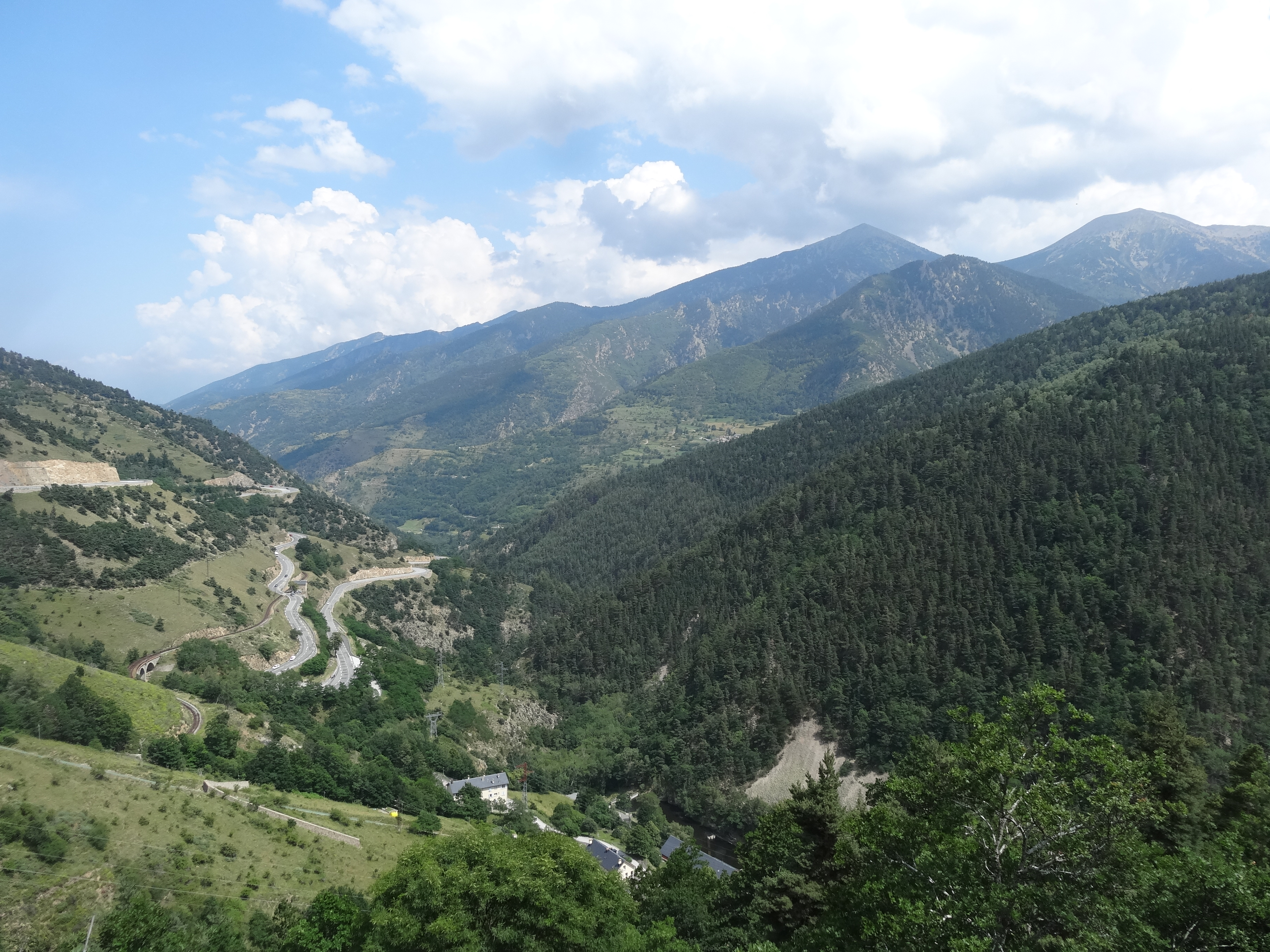 Vistes a l'est des d'un mirador de la N-116 (juliol 2013)